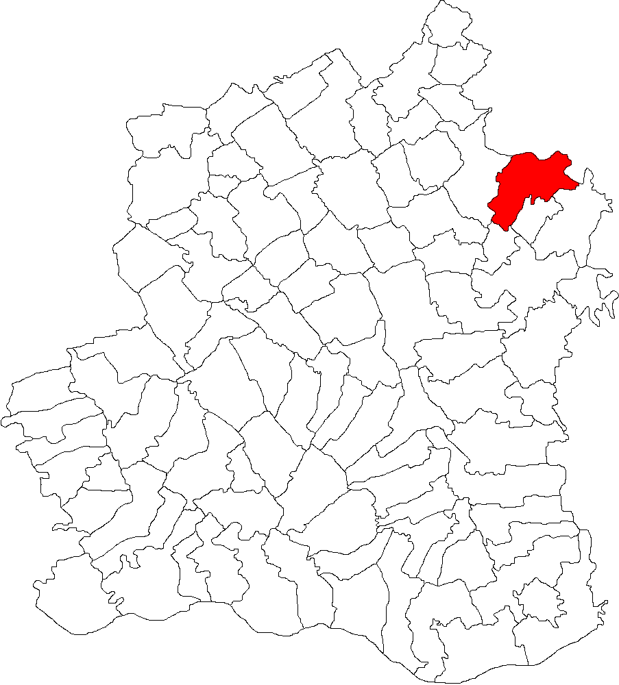 Categorie:Hărţi ale judeţului Teleorman